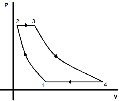 Representação do Ciclo de Brayton